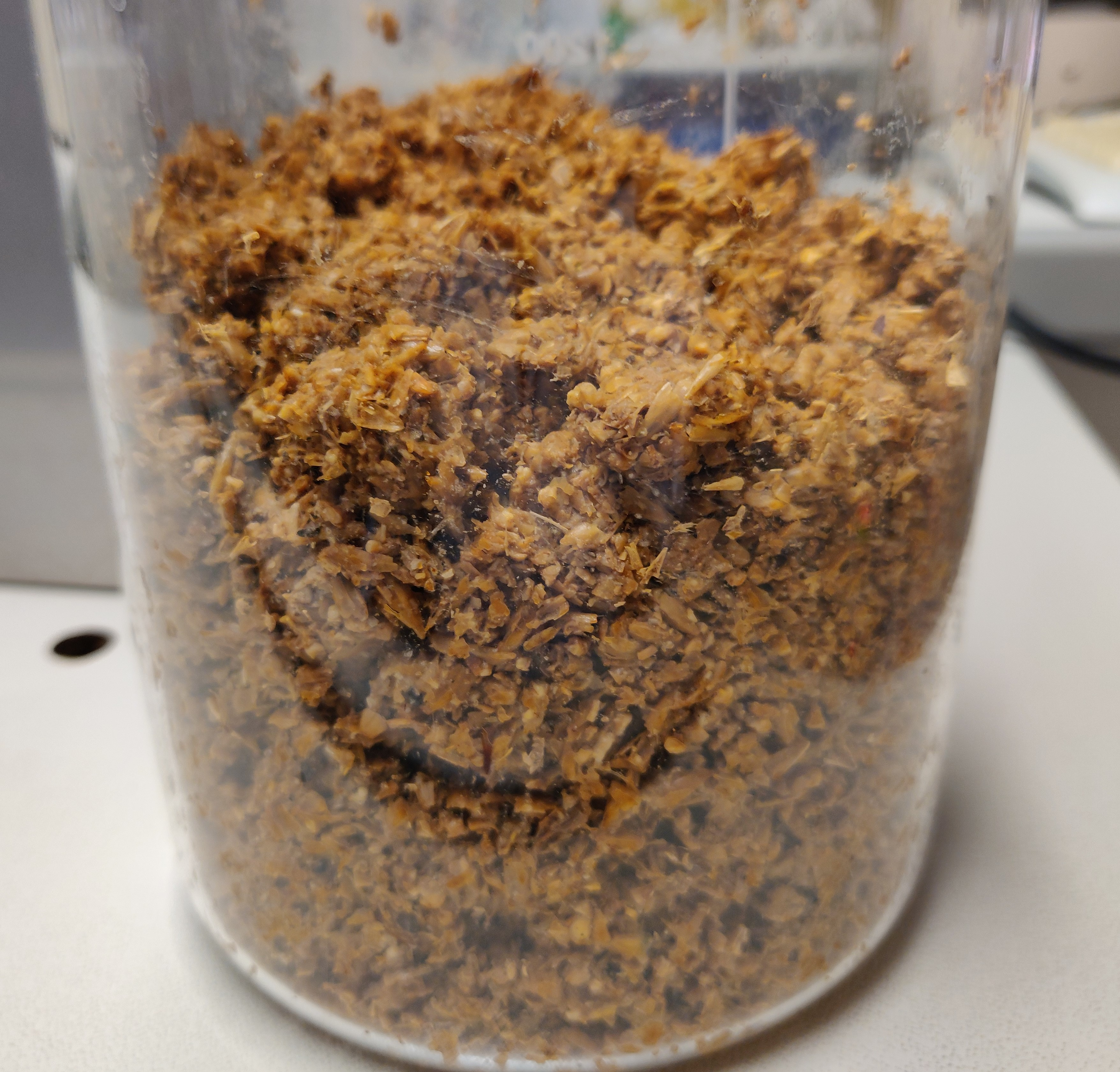 Dreche sample.